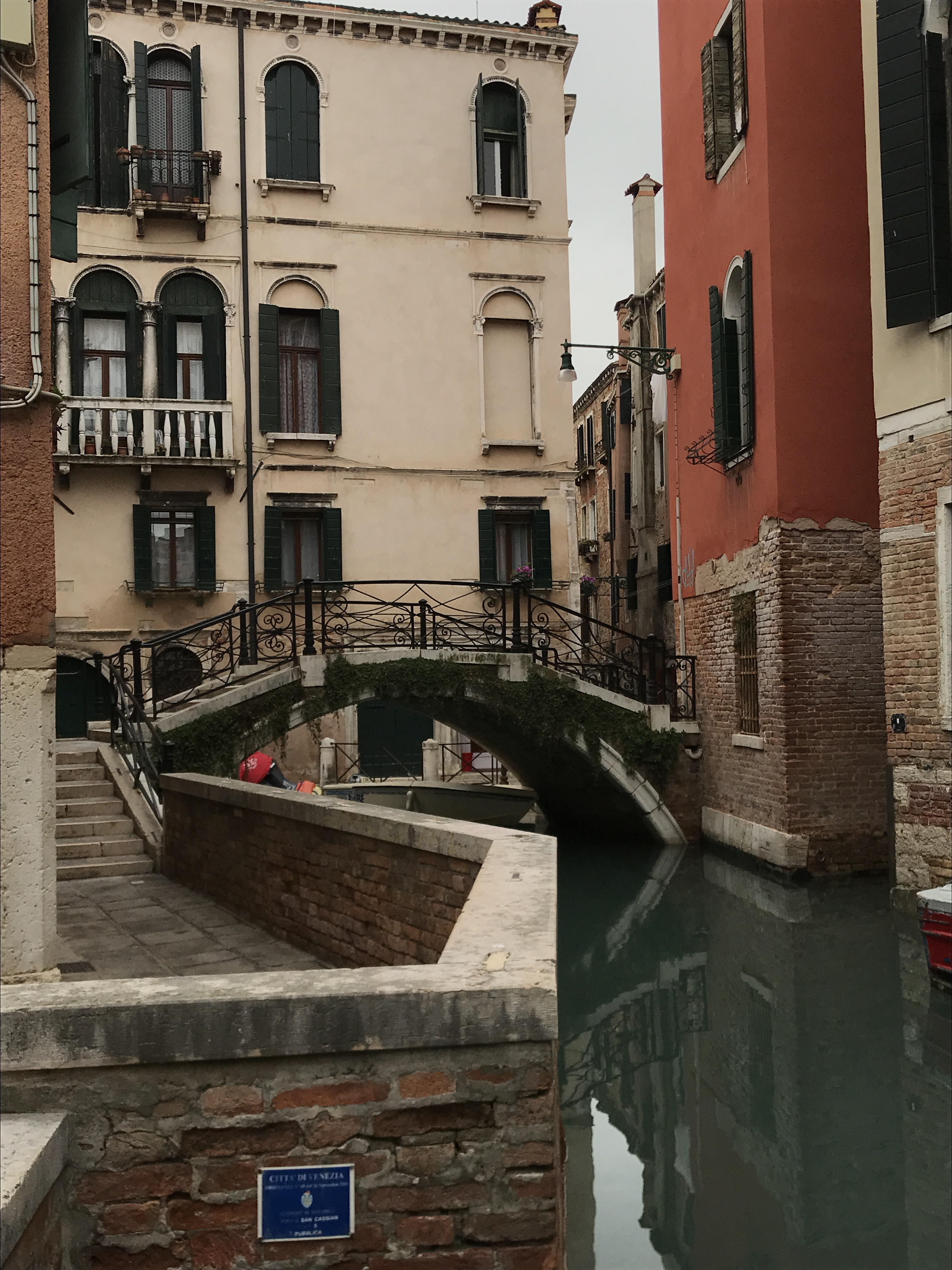 Venezia Rio Sant'Aponal